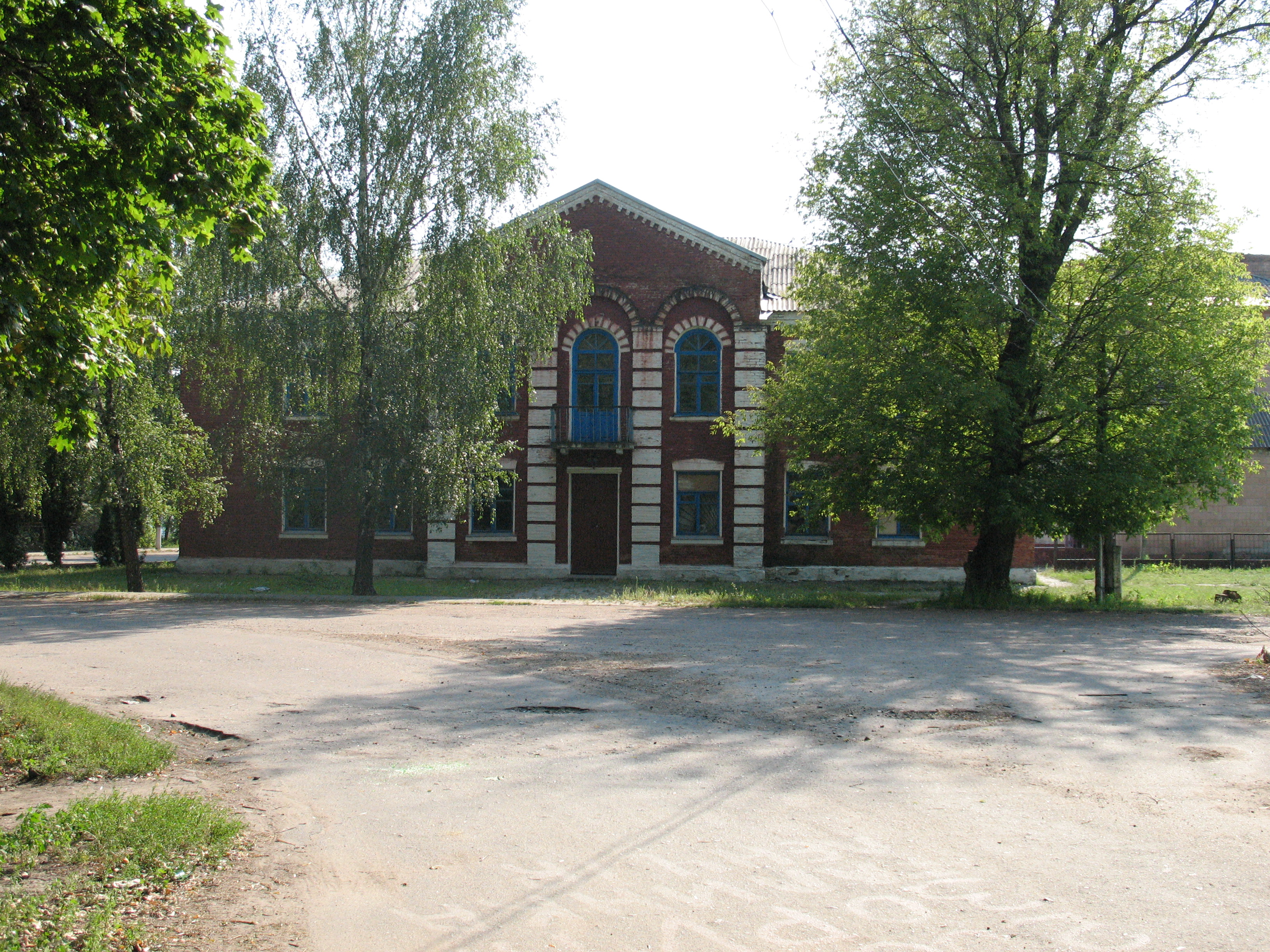 будівля початкової школи у смт Шрамківка, Драбівського р-ну, Черкаської області, Україна.